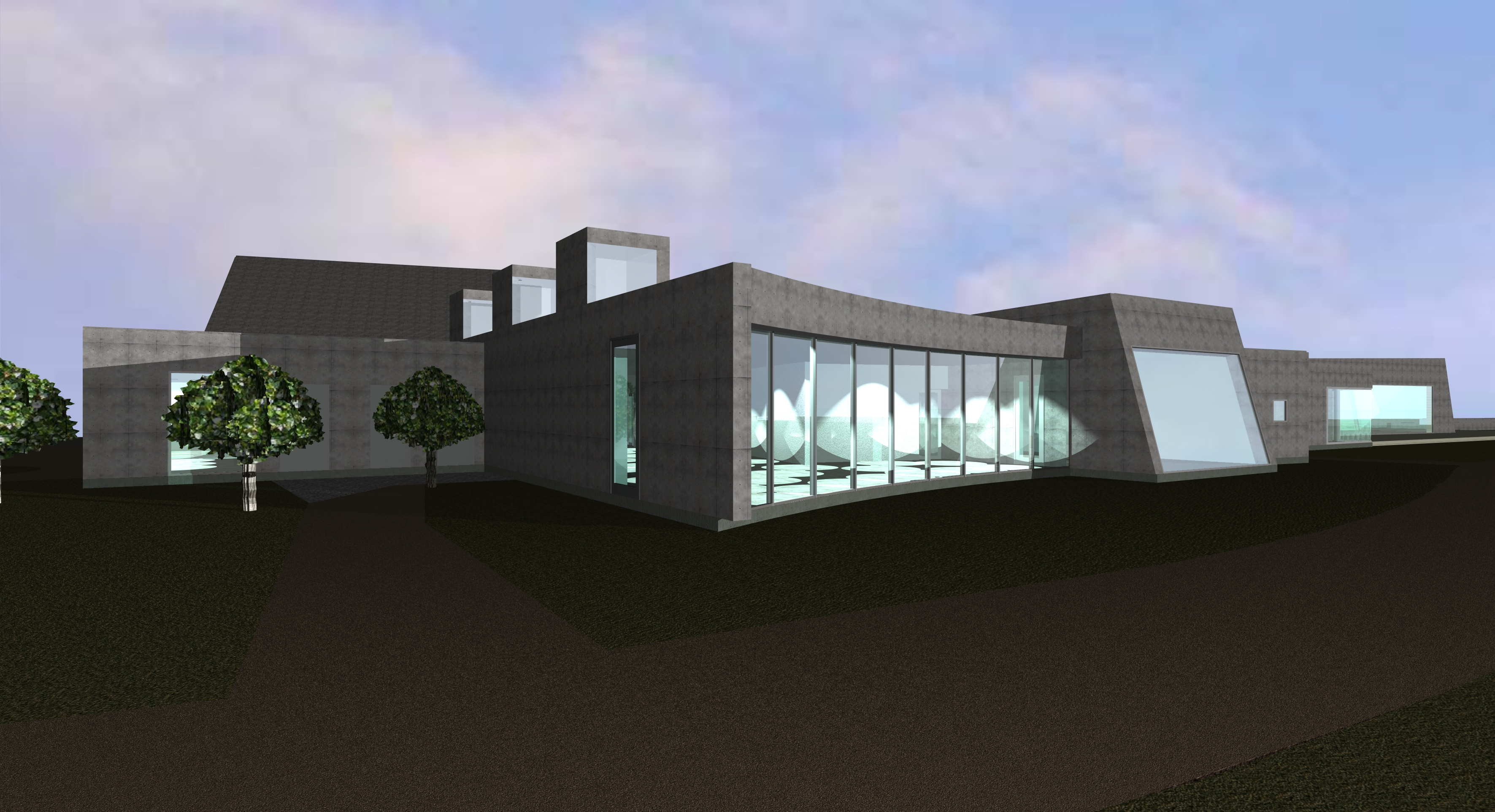 Pumphuset